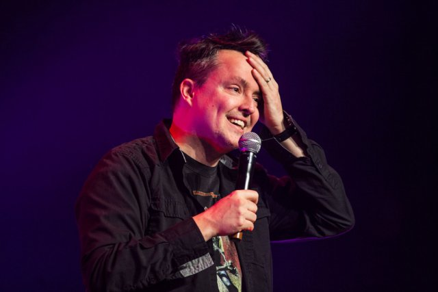 Mike Ward sur scène.